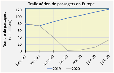 Nombre de passagers aériens en Europe en 2019 et 2020 Source OACI : Effects of Novel Coronavirus (COVID-19) on Civil Aviation: Economic Impact Analysis (19 August 2020)